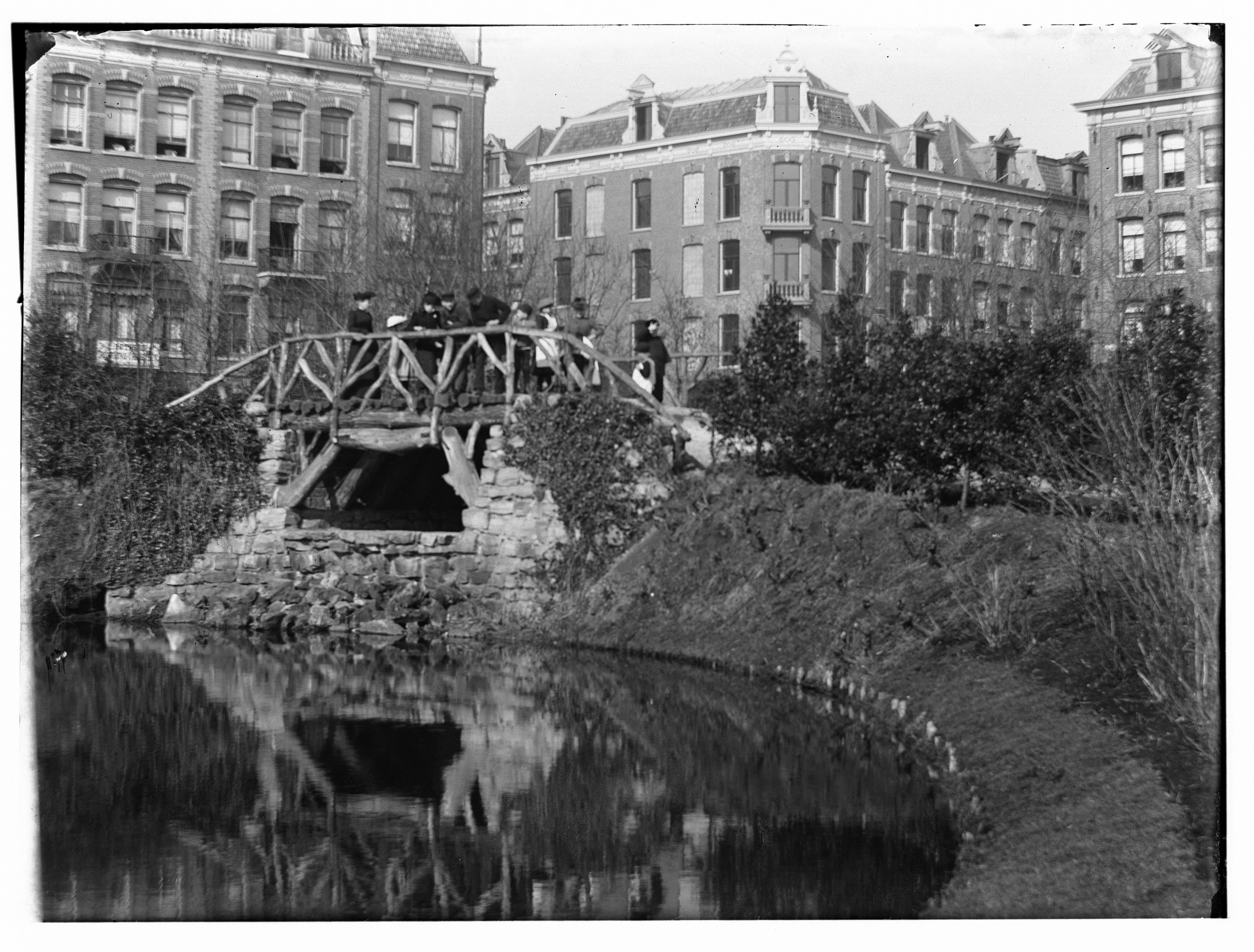 Beschrijving Sarphatipark Gezien naar huizen aan oneven zijde. In het midden de Eerste Sweelinckstraat. Rechts de Tweede Jan Steenstraat. Serie: Buurt en Stad Sarphatipark Documenttype foto Vervaardiger Olie``, Jacob (1834-1905) Collectie Collectie Jacob Olie Jbz. Datering 1891 Geografische naam Sarphatipark Inventarissen Afbeeldingsbestand 010019000261 Generated with Dememorixer